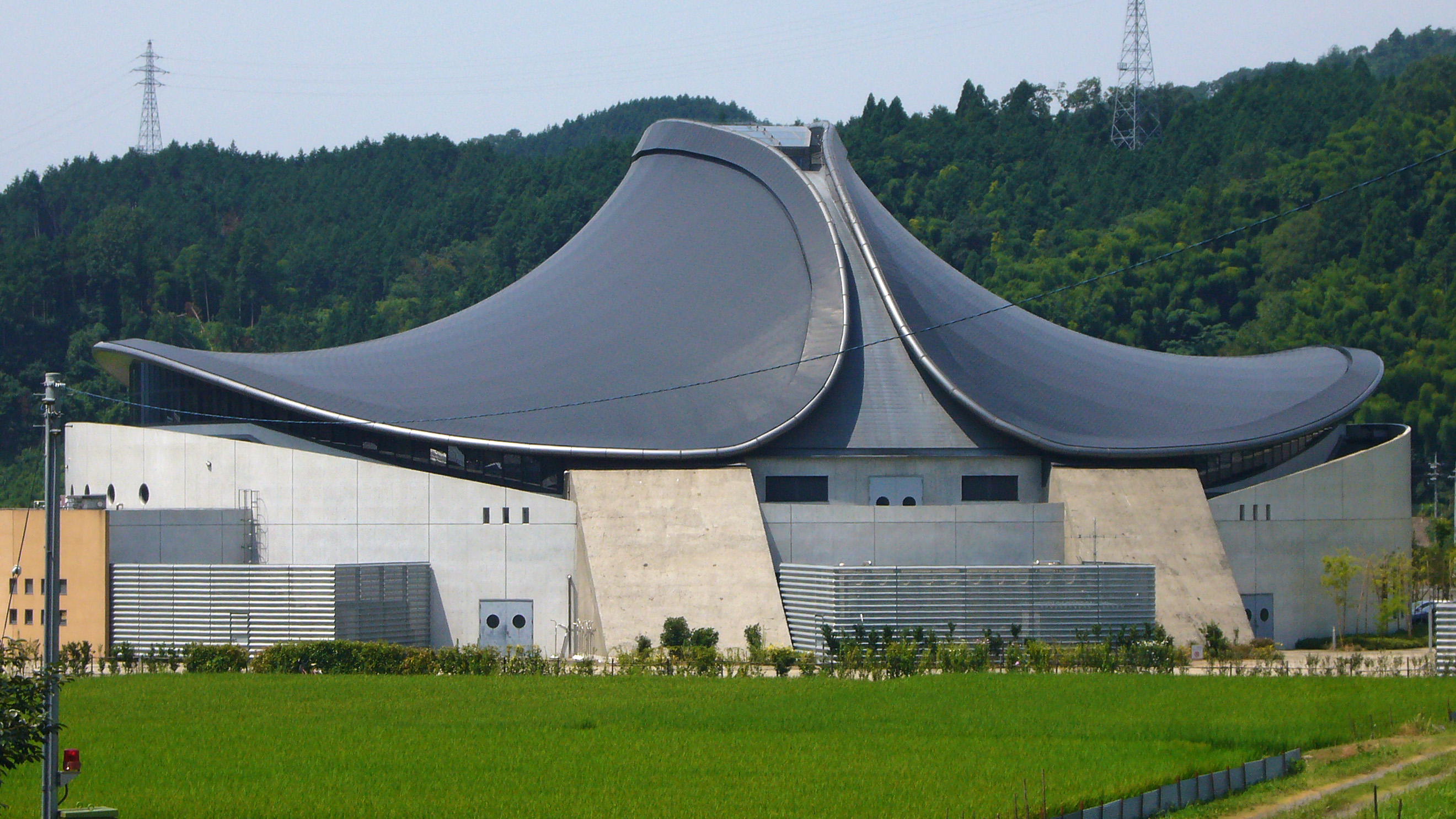 Musashi Budokan in Mimasaka, Okayama prefecture, Japan